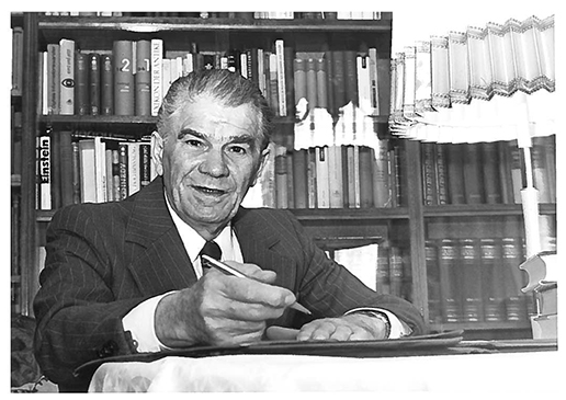 Prof. Dr. Herbert Kortum